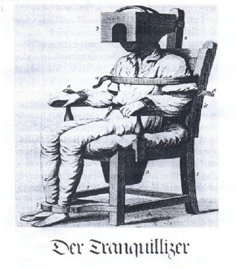 Die Abb. zeigt einen Zwangsstuhl, wie er um 1824 in psychiatrischen Anstalten gebräuchlich war.